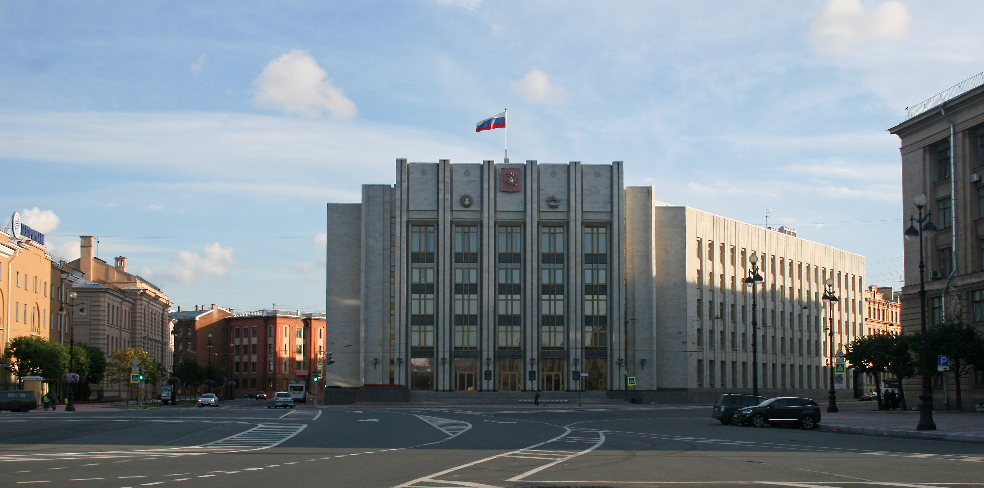 Здание законодательного собрание Ленинградской области. Санкт-Петербург, Суворовский проспект, 67. Вид со стороны площади Пролетарской Диктатуры.